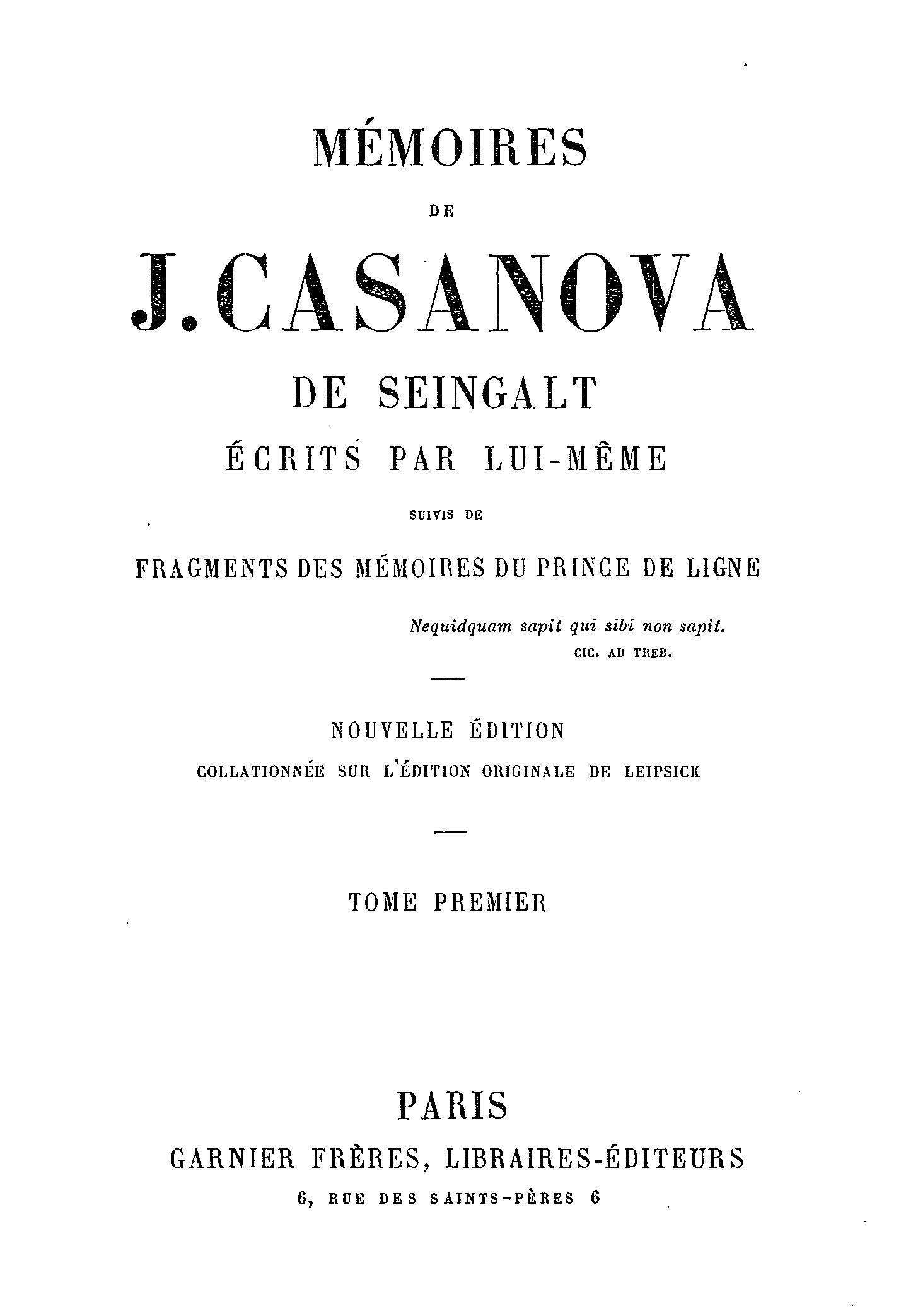 Title page of Mémoires de J. Casanova de Seingalt by Giacomo Casanova (1725-1798)